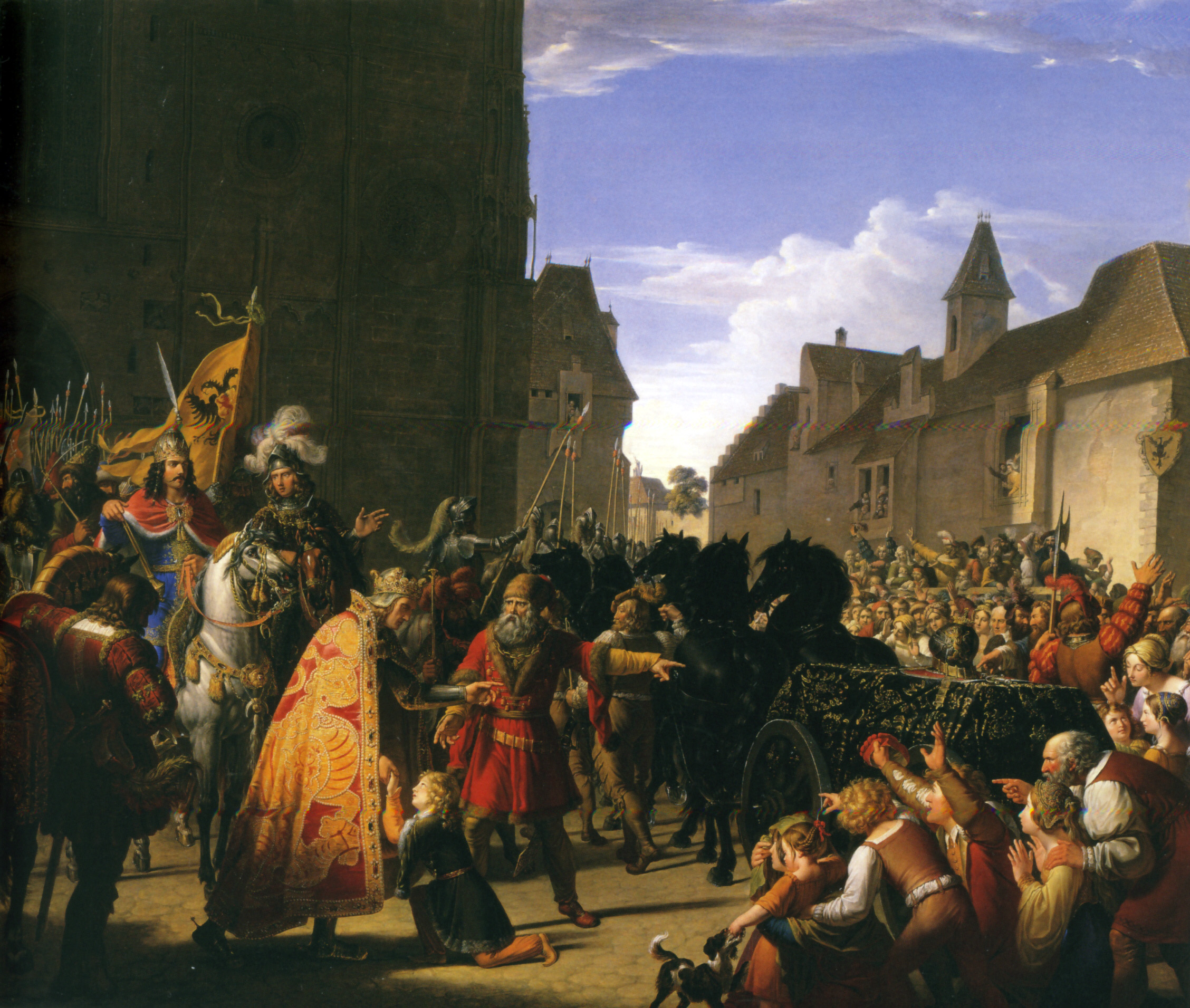 König Przemysl Ottokars Sohn Wenzel bittet Rudolf von Habsburg um die Leiche seines 1278 in der Schlacht bei Dürnkrut gefallenen Vaters